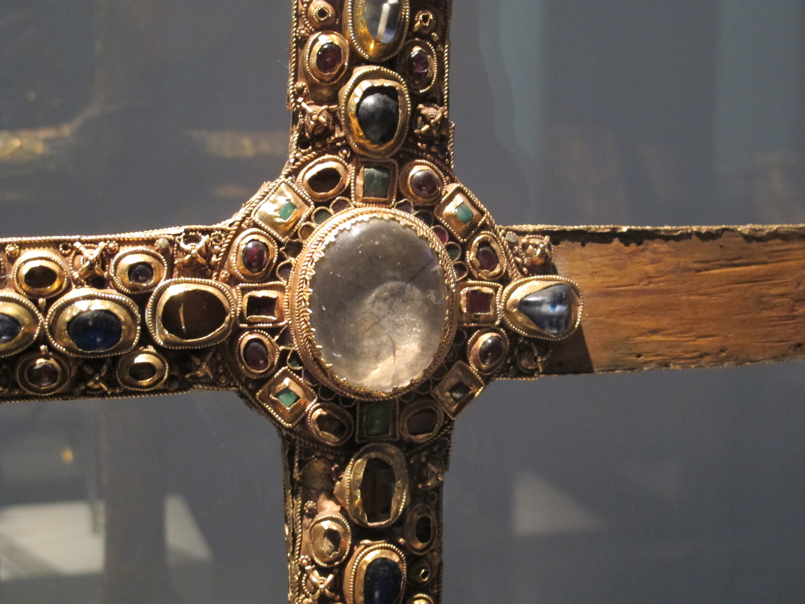 Ardennenkreuz (croce processionale), francia del nord o germania occ.le, 825-850 ca